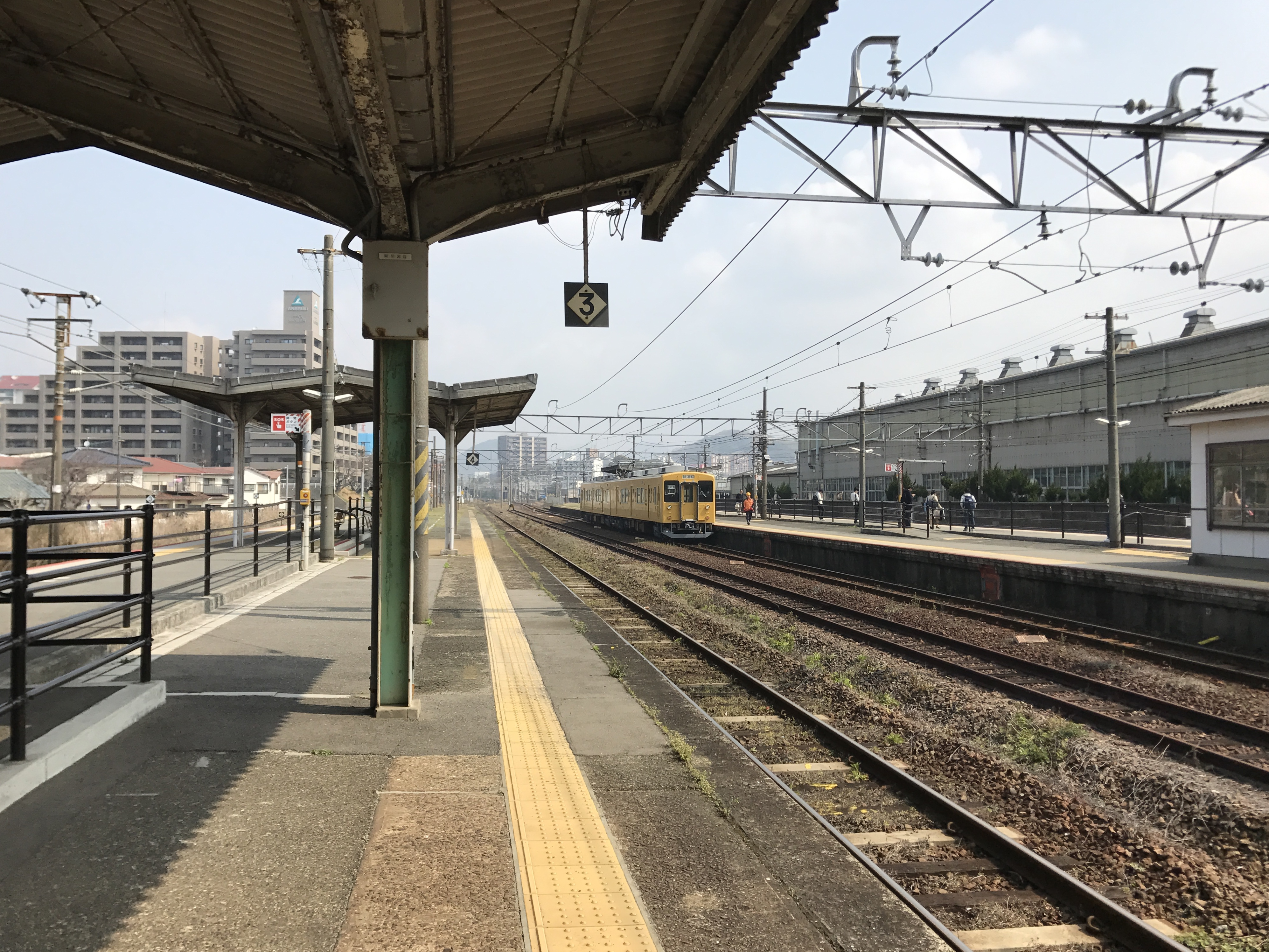 幡生駅のホーム(奥は綾羅木・新下関方面)